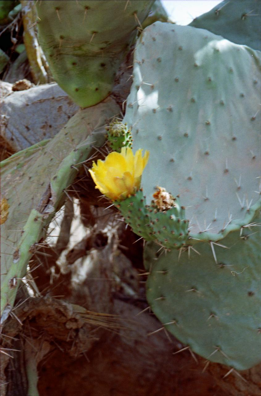 Morocco-84